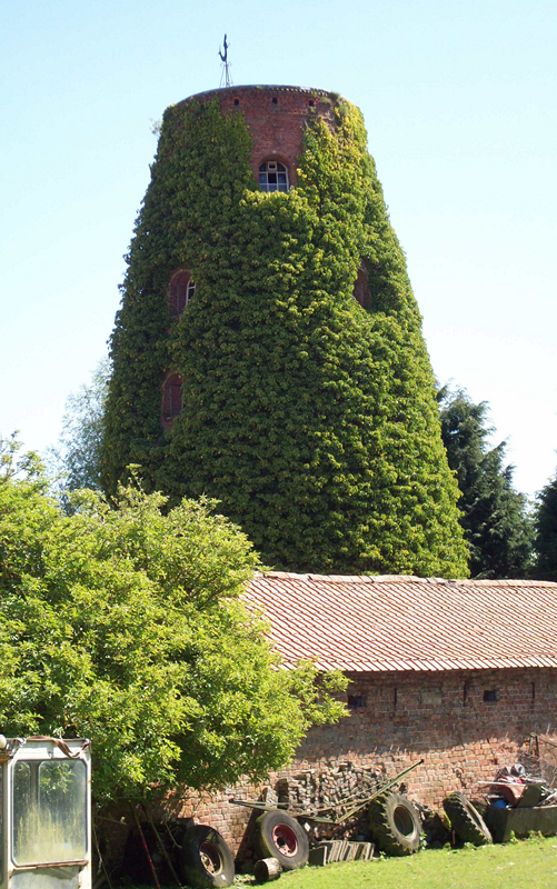 Rijksmonument Terhofstede - Meermin